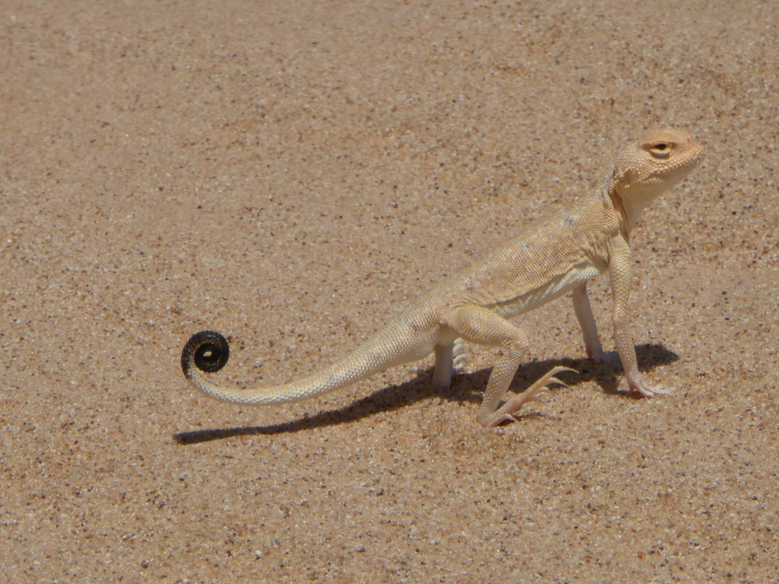 Phrynocephalus maculatus